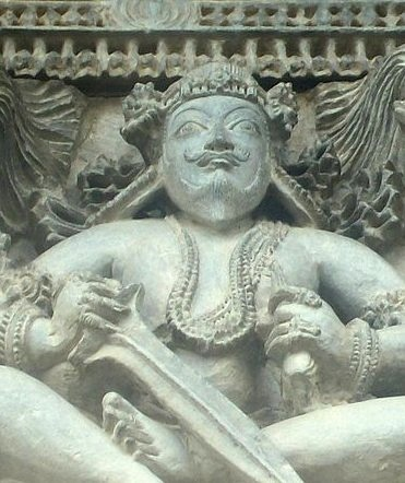 ಕನ್ನಡ: ಹೊಯ್ಸಳ ಸಾಮ್ರಾಜ್ಯದ ಅತ್ಯಂತ ಪ್ರಸಿದ್ಧ ಅರಸು ಬಿಟ್ಟಿಗ, ಈತನ ನಂತರದ ಹೆಸರು ವಿಷ್ಣುವರ್ಧನ (ಆಡಳಿತ: ಸು ೧೧೧೦-೧೧೪೨). ವಿಷ್ಣುವರ್ಧನನ ಆಡಳಿತದ ಕಾಲದಲ್ಲಿ ಹೊಯ್ಸಳ ಸಾಮ್ರಾಜ್ಯ ಇಂದಿನ ಕರ್ನಾಟಕ ರಾಜ್ಯದ ಬಲಿಷ್ಠ ಸಾಮ್ರಾಜ್ಯವಾದದ್ದಲ್ಲದೆ ಪಕ್ಕದ ರಾಜ್ಯಗಳಲ್ಲಿಯೂ ವಿಸ್ತರಿಸಿತು. Panel depicting the Hoysala ruler Vishnuvardhana, and court scene, at the Chennakesava temple.